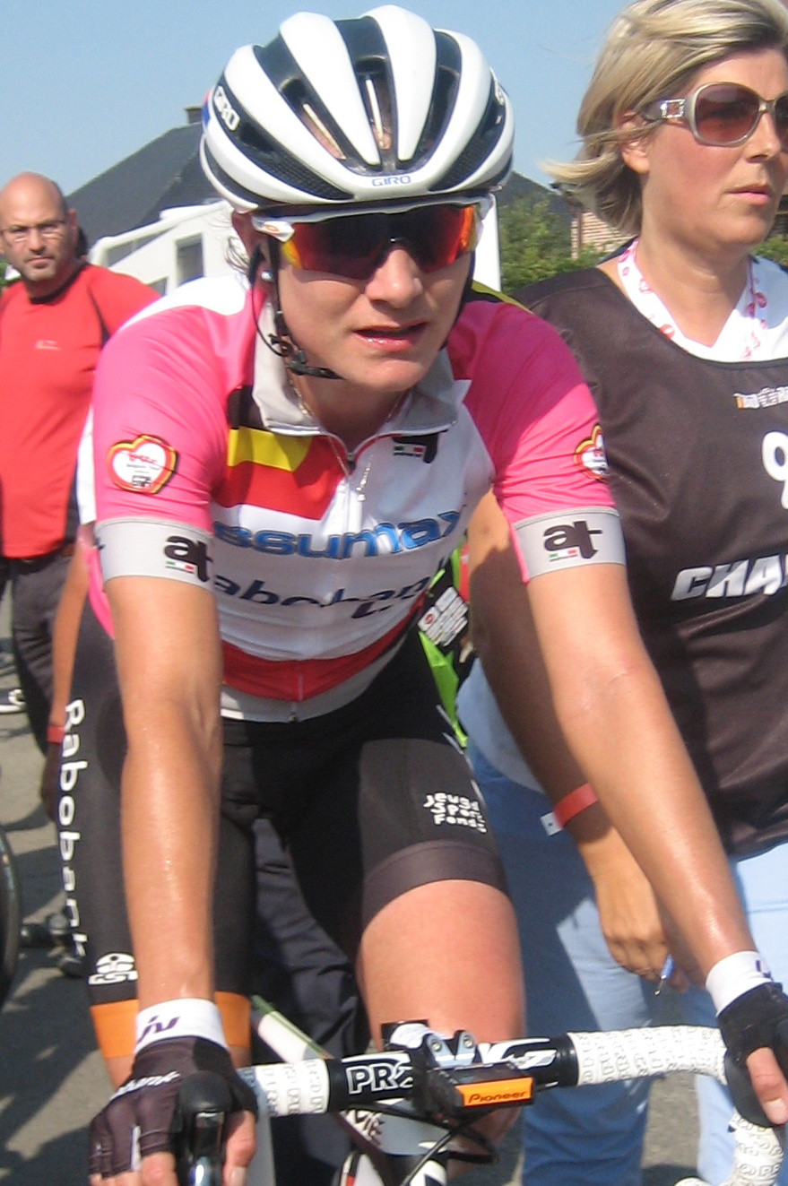 Na de finish van de 2e etappe van de Lotto Belgium Tour 2016 in Lierde.